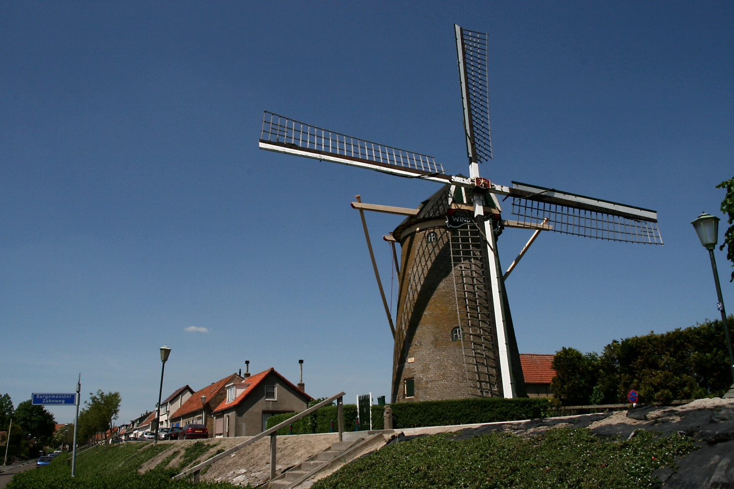 Goudswaard: molen Windlust